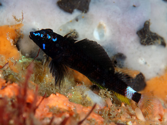 キビレヘビギンポ Enneapterygius senoui